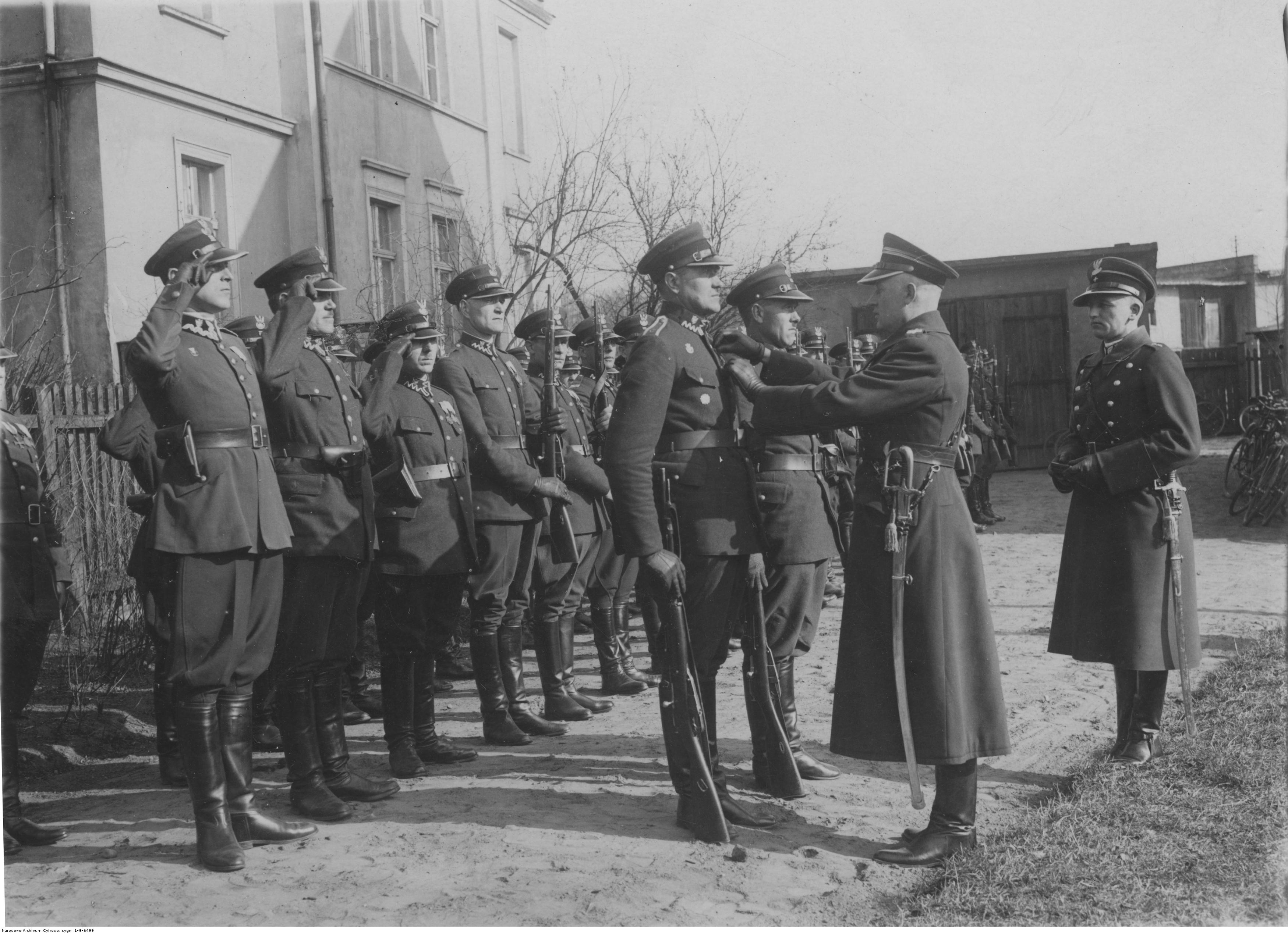 Nadkomisarz Hałgas dekoruje brązowym Krzyżem Zasługi podoficerów Straży Granicznej w Inspektoracie w Lesznie; 1934 r. Koncern Ilustrowany Kurier Codzienny - Archiwum Ilustracji. Sygnatura: 1-G-6499